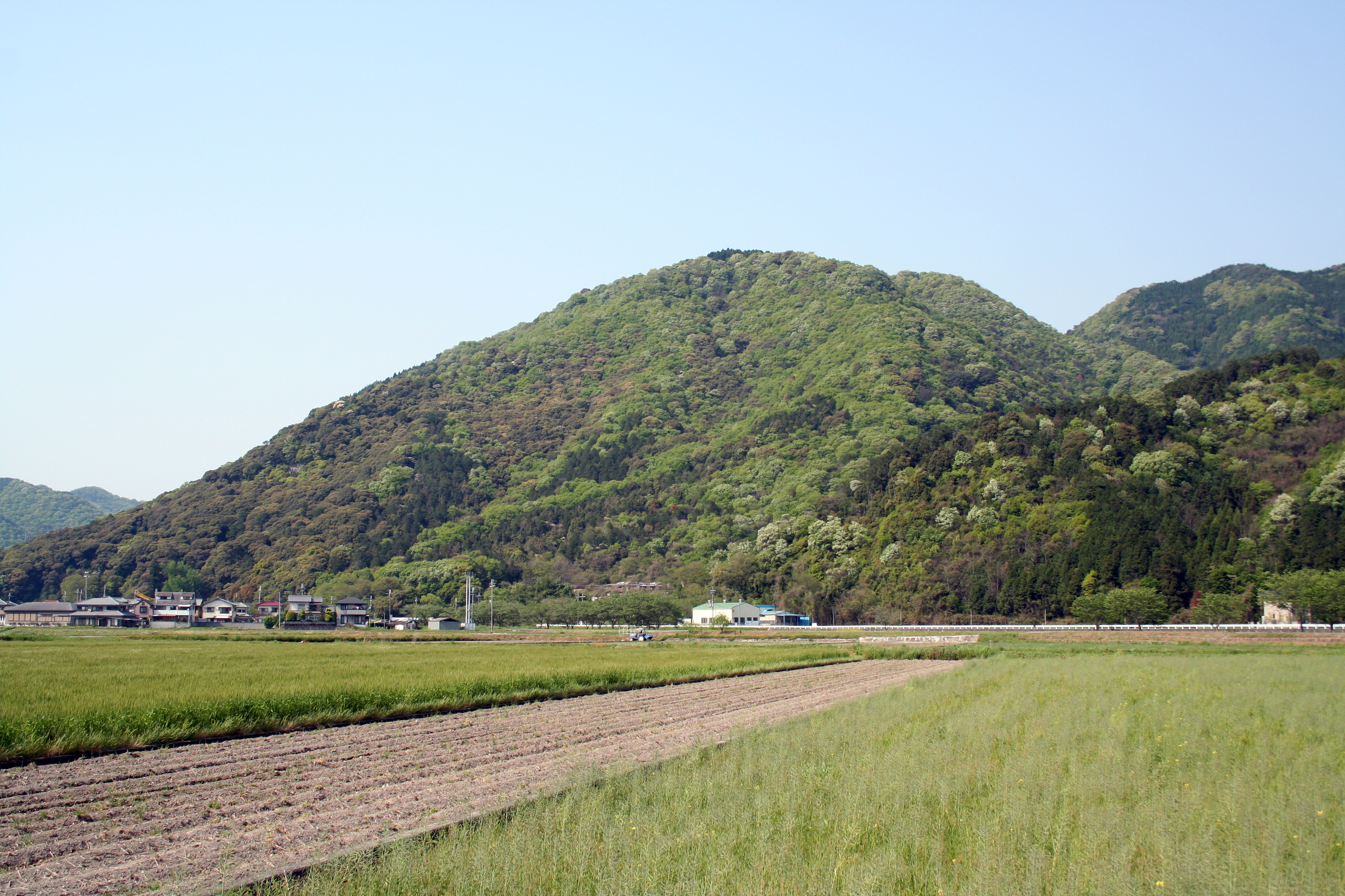 日本の戦国時代の頃、この地を治めていた赤松氏の居城があった置塩山。